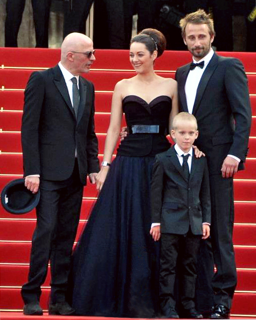 Jacques Audiard, Marion Cotillard, Matthias Schoenaerts et le petit Armand Verdure au festival de Cannes